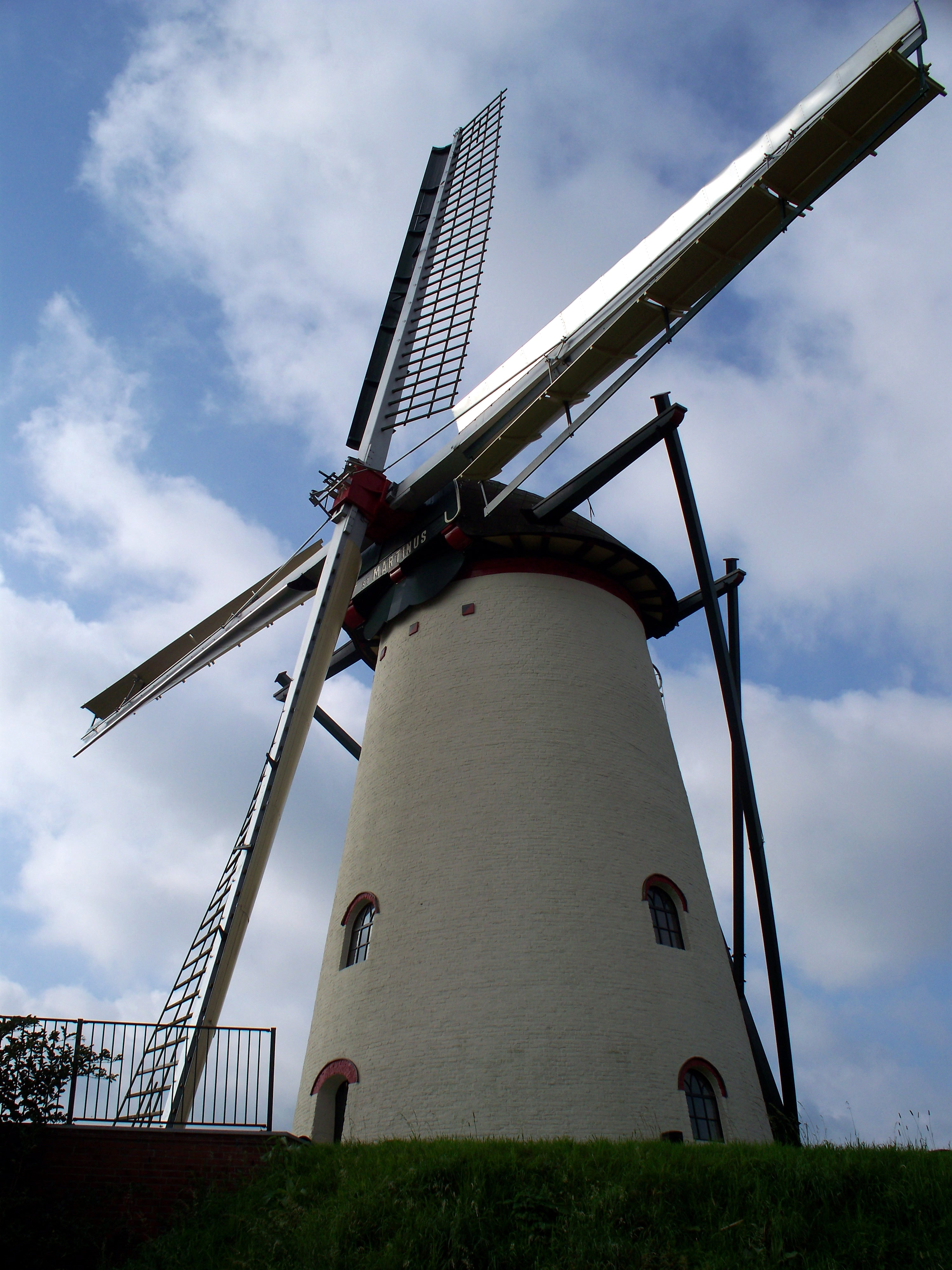 Molen Sint Martinus te Didam, Wilhelminastraat